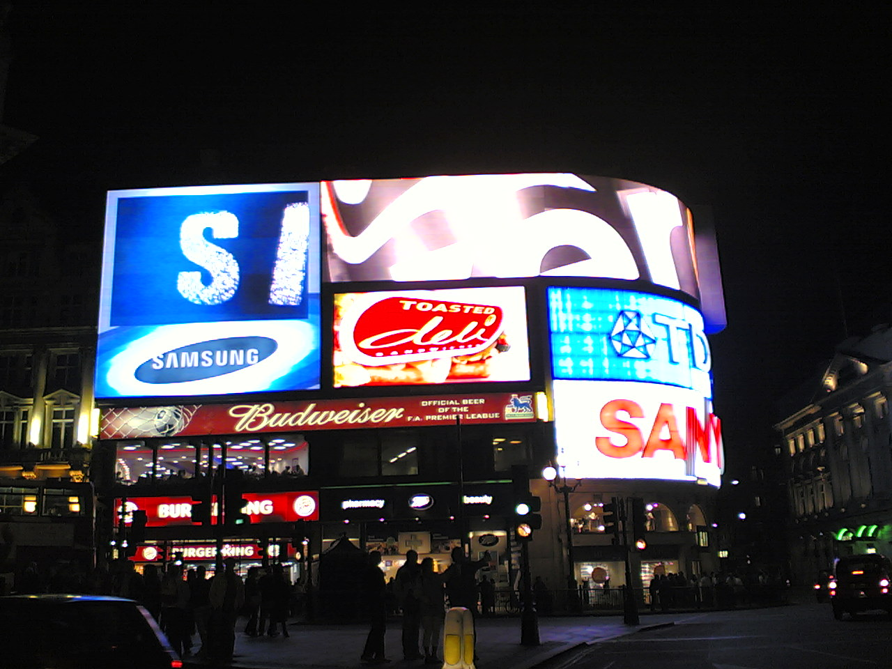 ساحة بيكاديللي الشهيرة وسط لندن ليلا